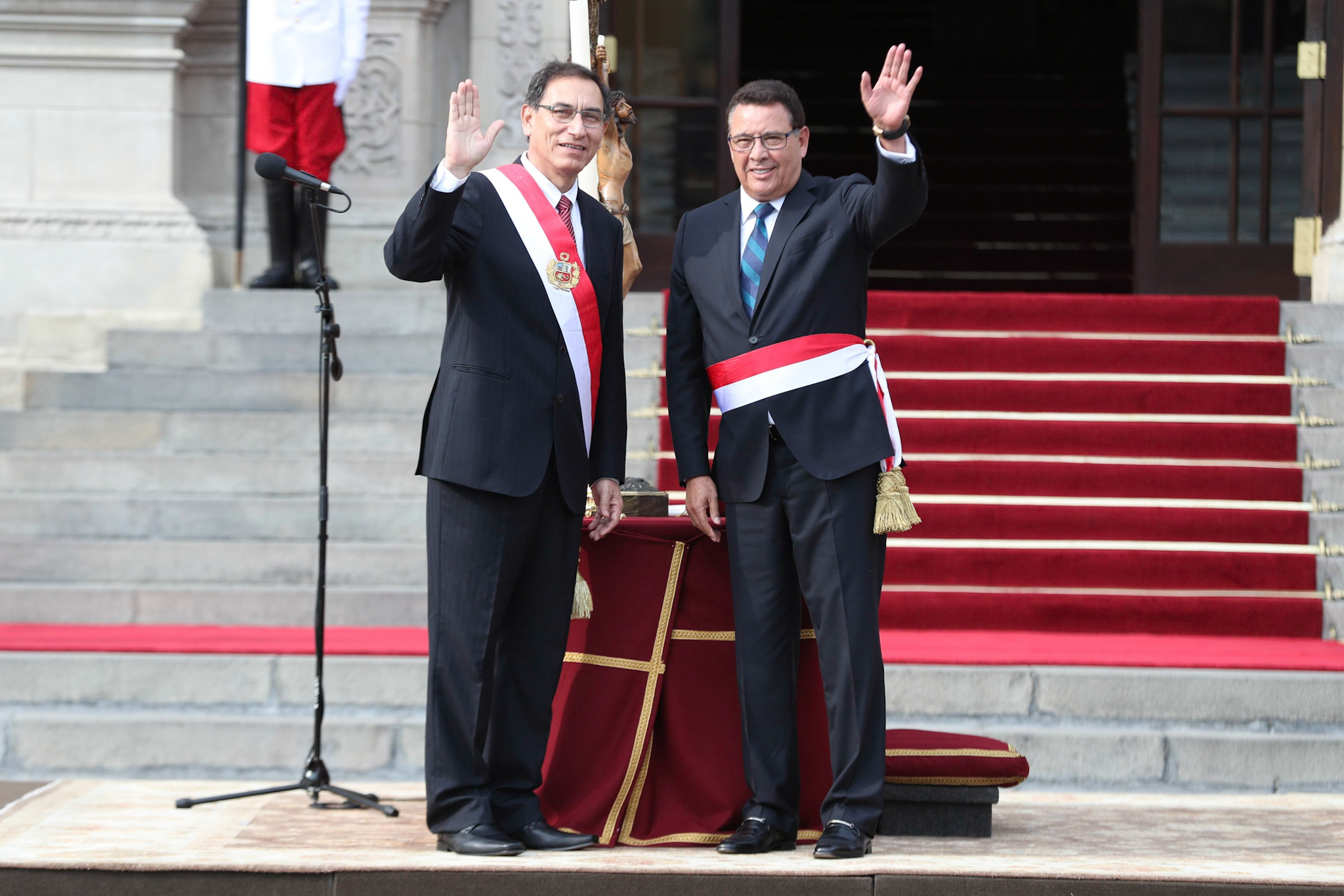 Presidente Martín Vizcarra tomó juramento en el cargo de Ministro de Defensa a General (r) José Huerta Torres.